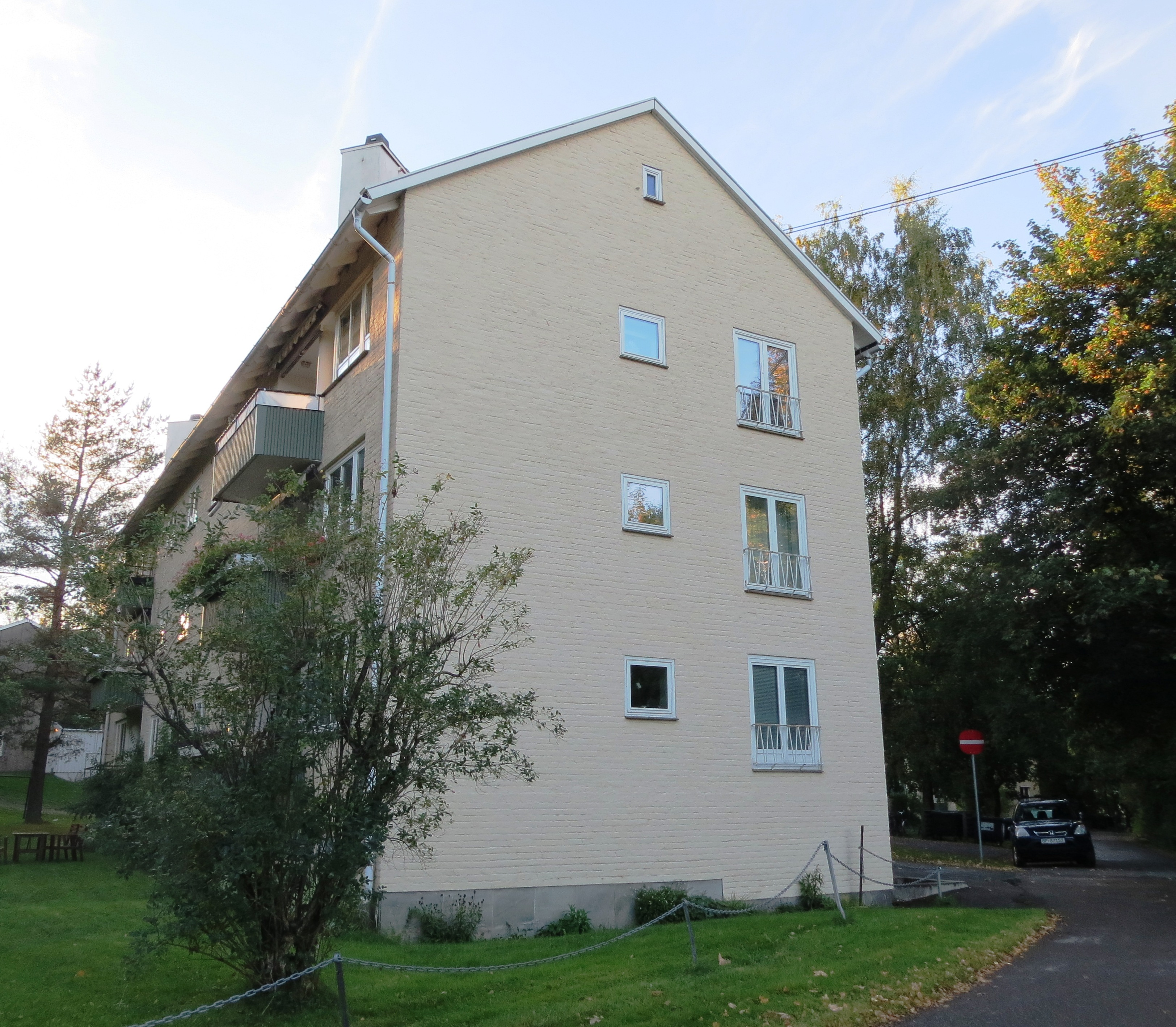 Flyveien, Luftfartsveien og Landingsveien har et sammenhengende, funksjonalistisk blokkmiljø omkring "Snippen", med kommunalt listeført bygningsvern. Hovseter i bydel Vestre Aker, Oslo.